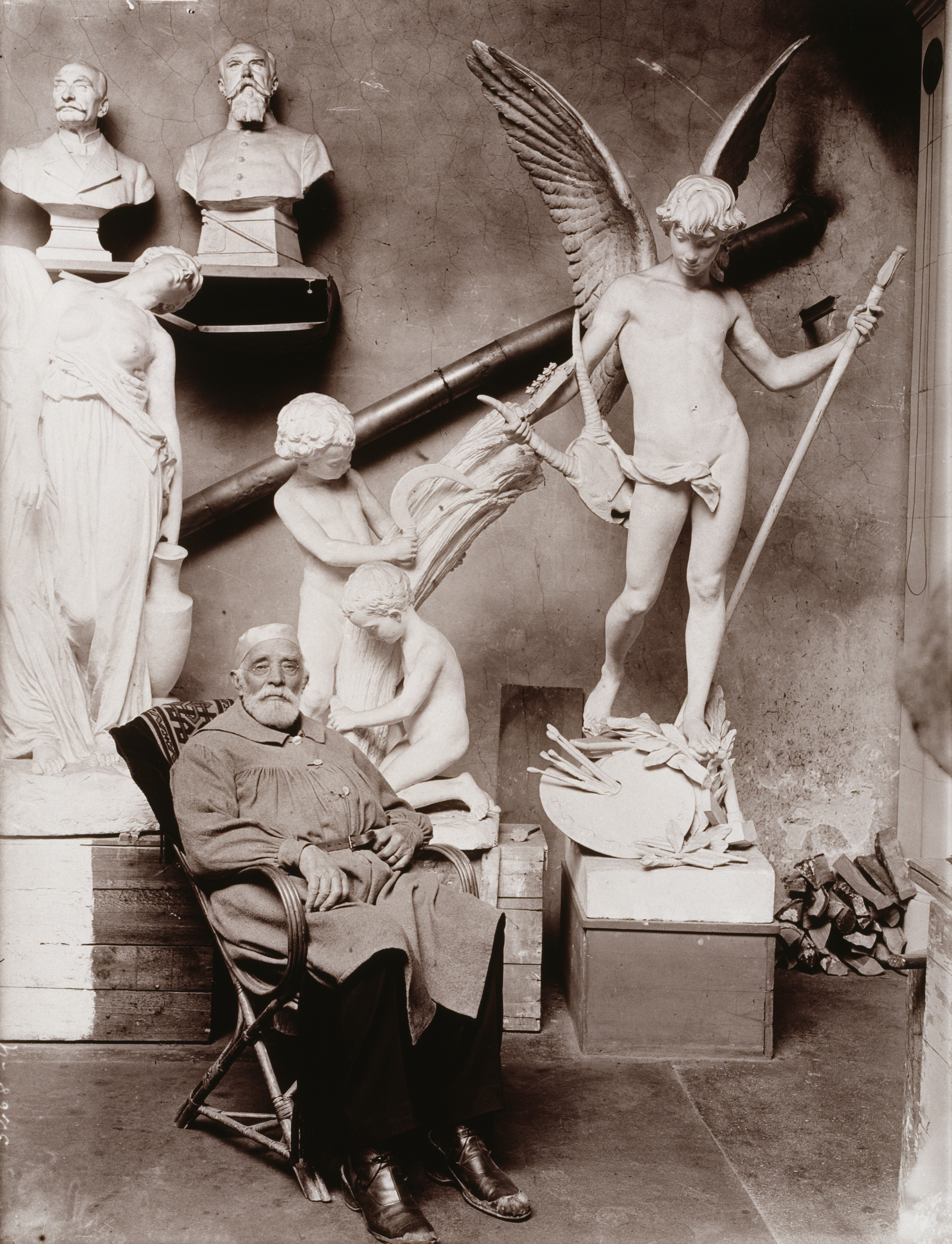 Atelier Eric Sundström (d.1933): Sculptor Walter Runeberg in his studio, 1910s (1980s). Silver gelatin print from original glass plate negative. / Kuvanveistäjä Walter Runeberg ateljeessaan, 1910-luku. Vedostettu 1980-luvulla alkuperäisestä lasinegatiivista. The Finnish Museum of Photography / Suomen valokuvataiteen museo